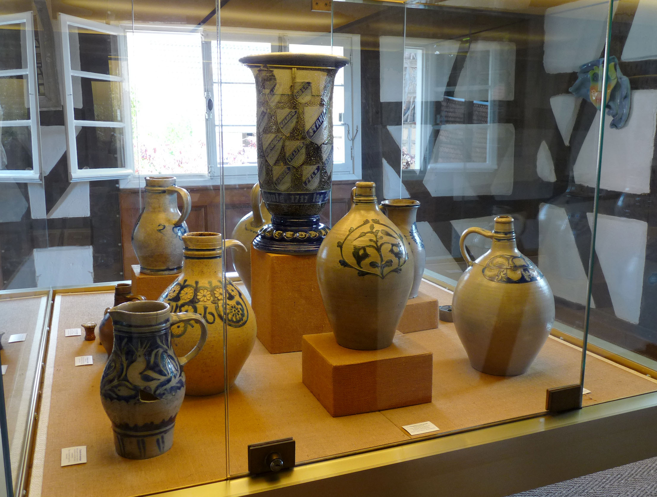 Musée de la poterie de Betschdorf (Bas-Rhin)